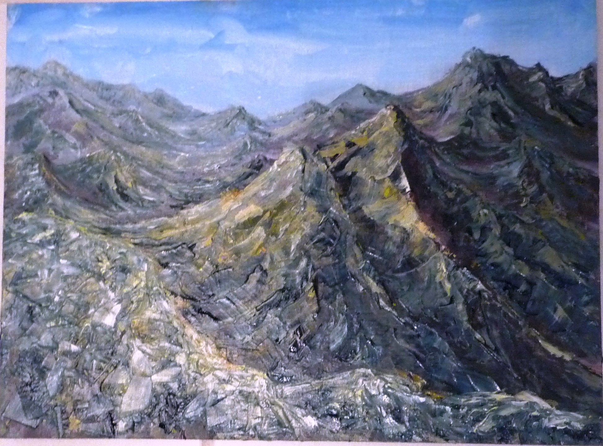 malba hor